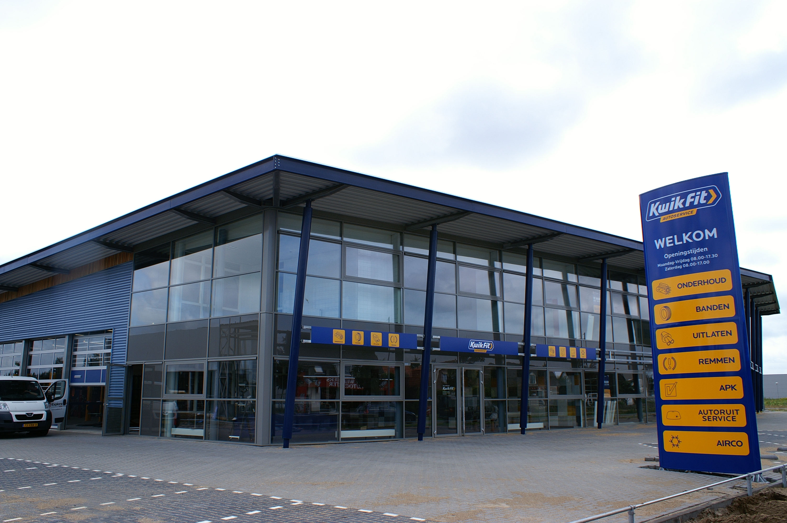 Kwik-Fit filiaal Heemskerk